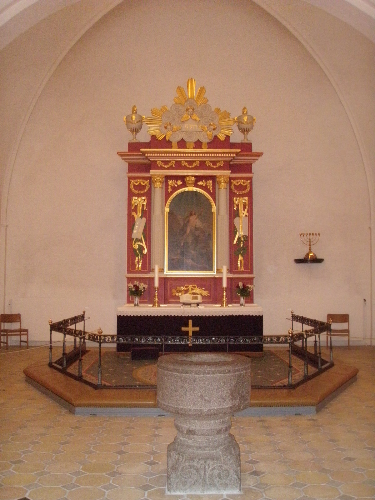 Interiörbild från Sankt Nikolaj Kirke i Vejle Kommune.